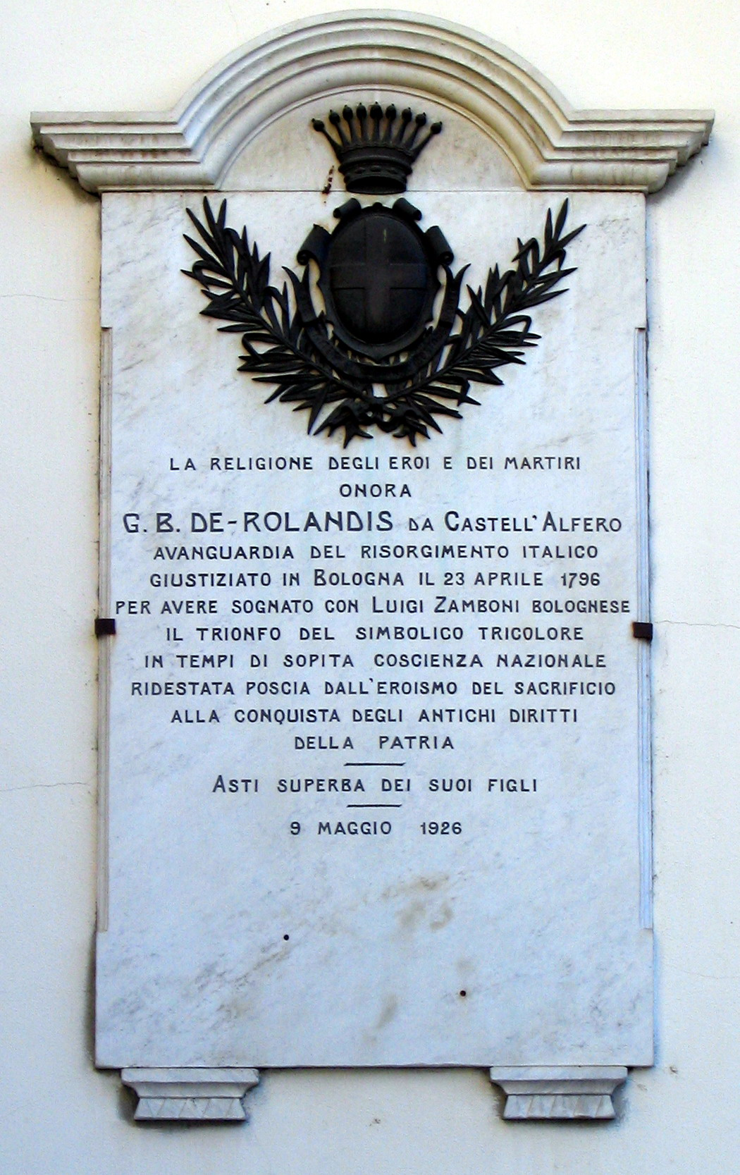 Asti, Palazzo di Città (municipio): lapide commemorativa a Giovanni Battista De Rolandis, protomartire risorgimentale astigiano.